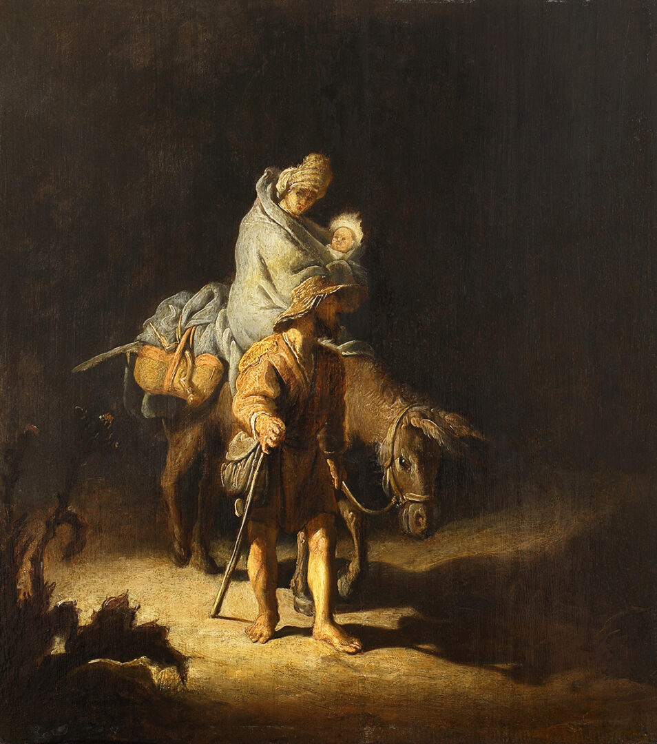 La Fuite en Égypte, tableau de Rembrandt (1627) Musée des Beaux-Arts de Tours